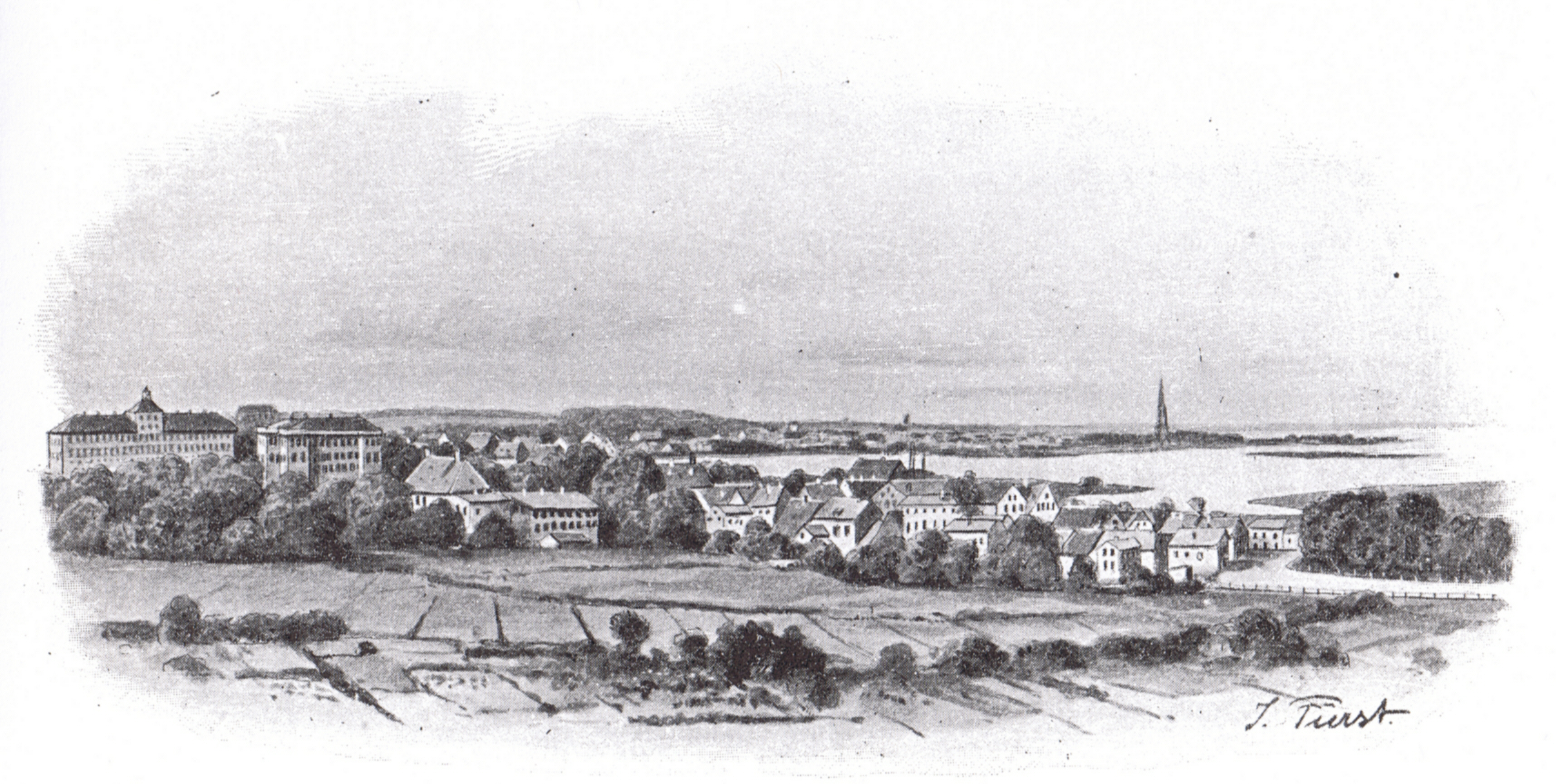 Schleswig in Schleswig-Holstein von Julius Fürst.